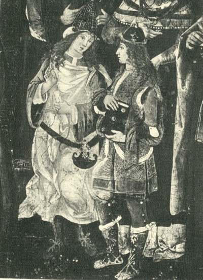 Jofré Borgia y su esposa Sancha de Aragón